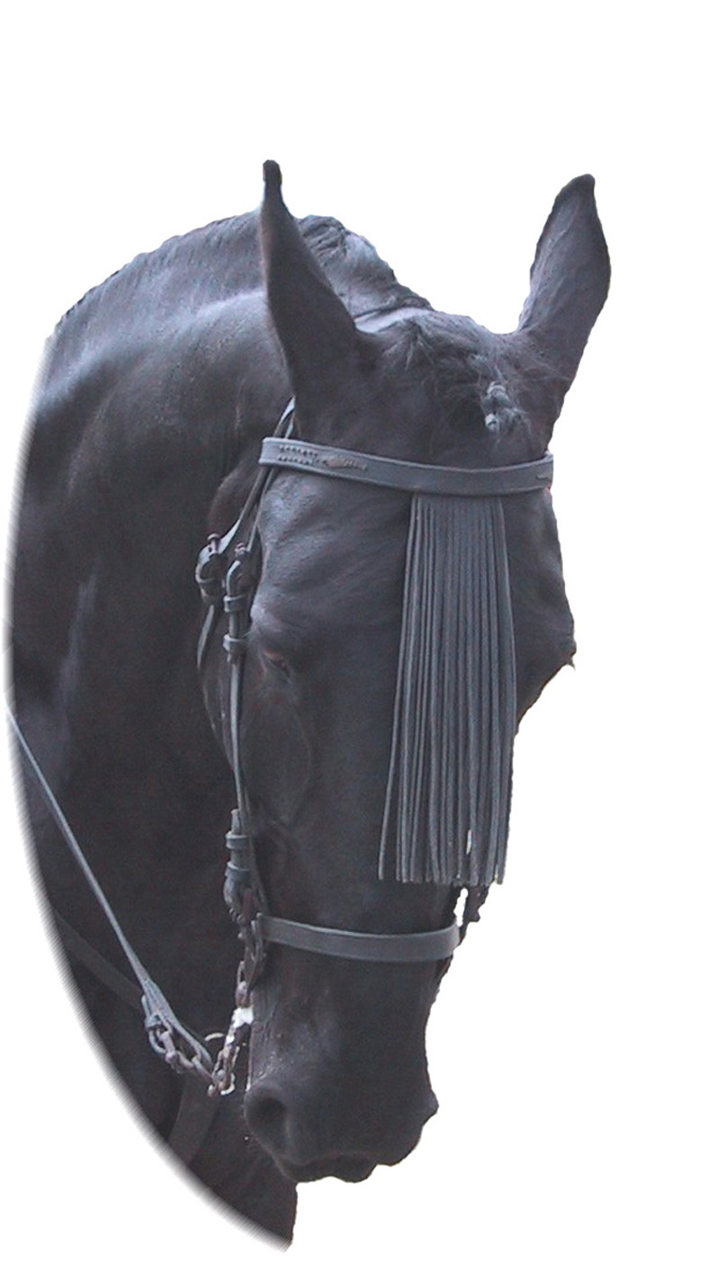 cavalla Murgese Macina, primo piano.